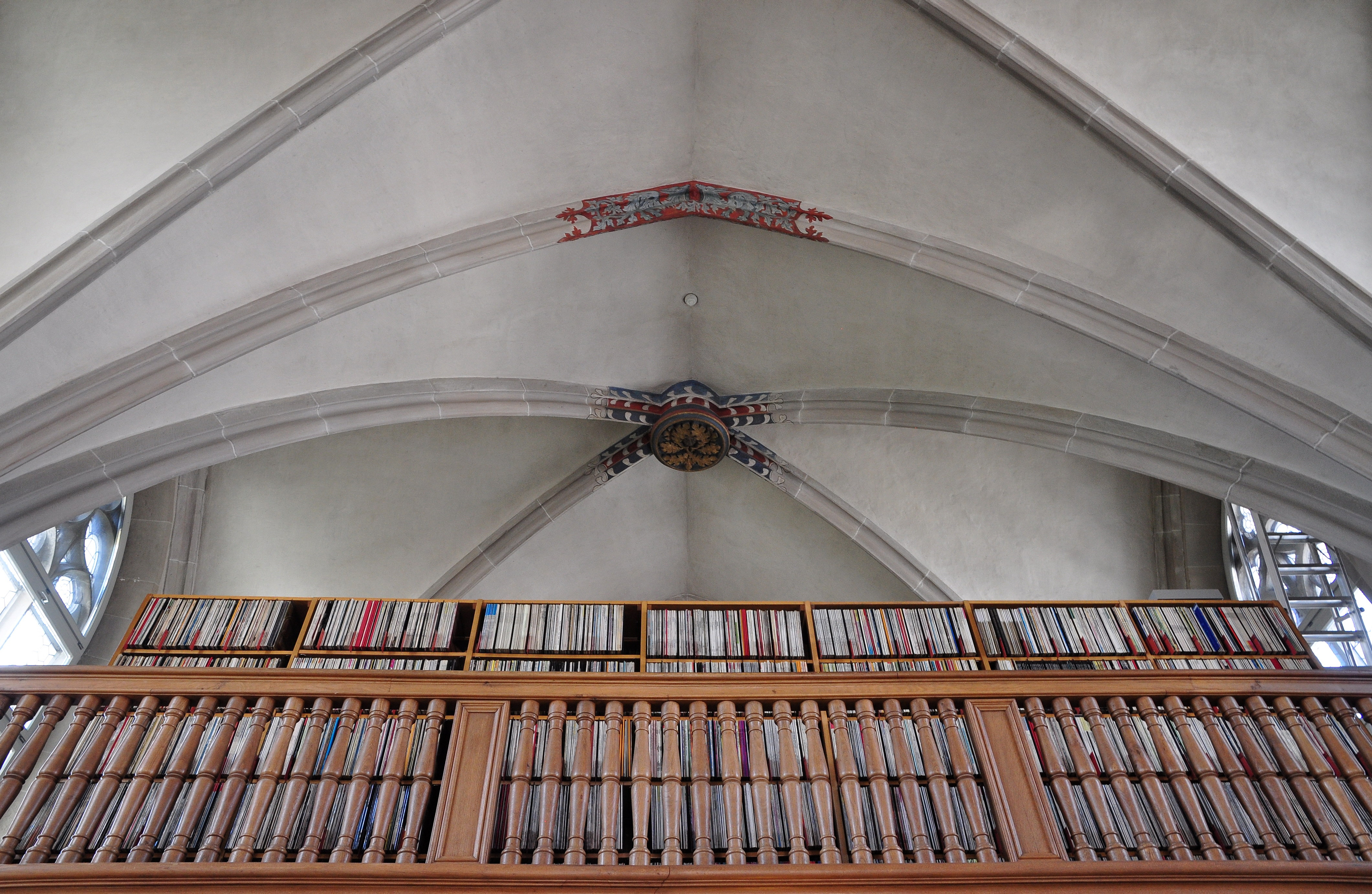 Zentralbibliothek, Musikabteilung (Predigerchor), Predigerplatz 1 in Zürich (Switzerland)